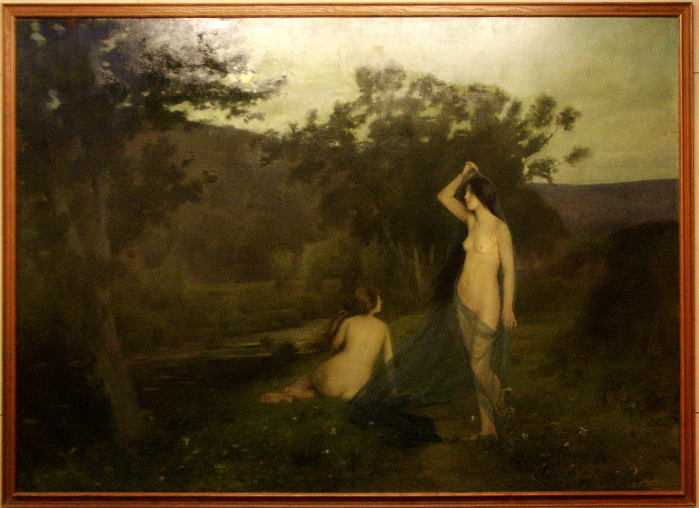 Les Ninfes de l'Ocas, obra de Joan Brull i Vinyoles (Barcelona, 1863 - 1912) que es troba al Museu Comarcal de la Garrotxa (Catalunya). L'obra es va presentar a l'Exposició Nacional de Madrid de 1899 on va obtenir la medalla de segona classe.